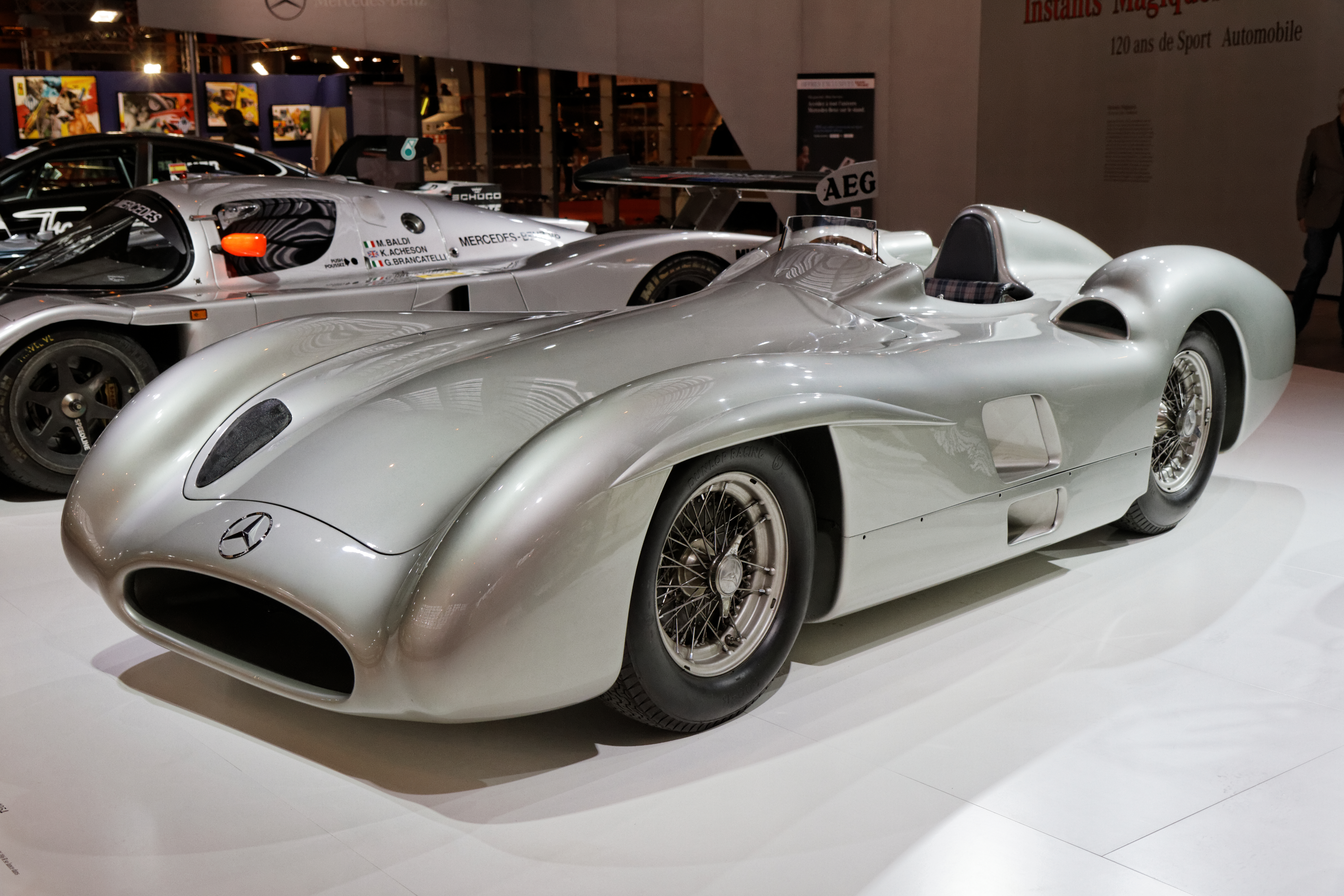 Une Mercedes-Benz W 196 R Stromlinie exposée lors du salon Retromobile 2014.